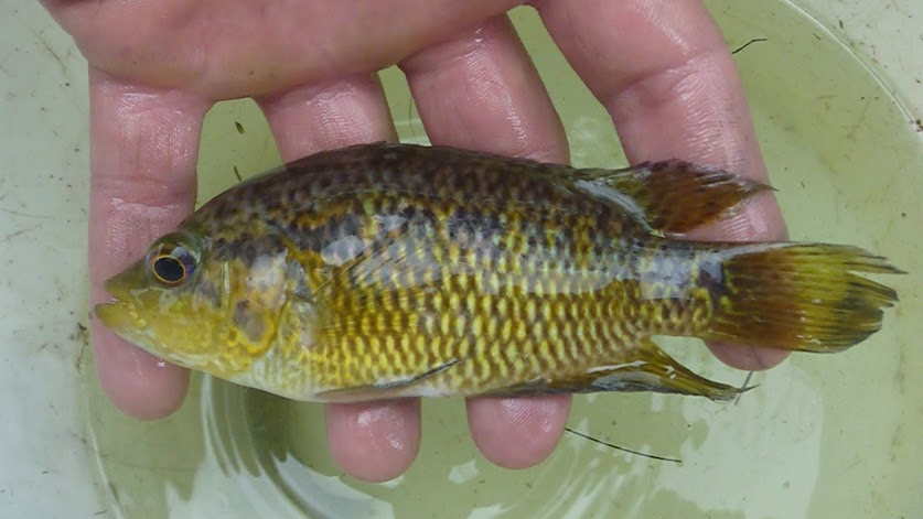 Especie de parachromis